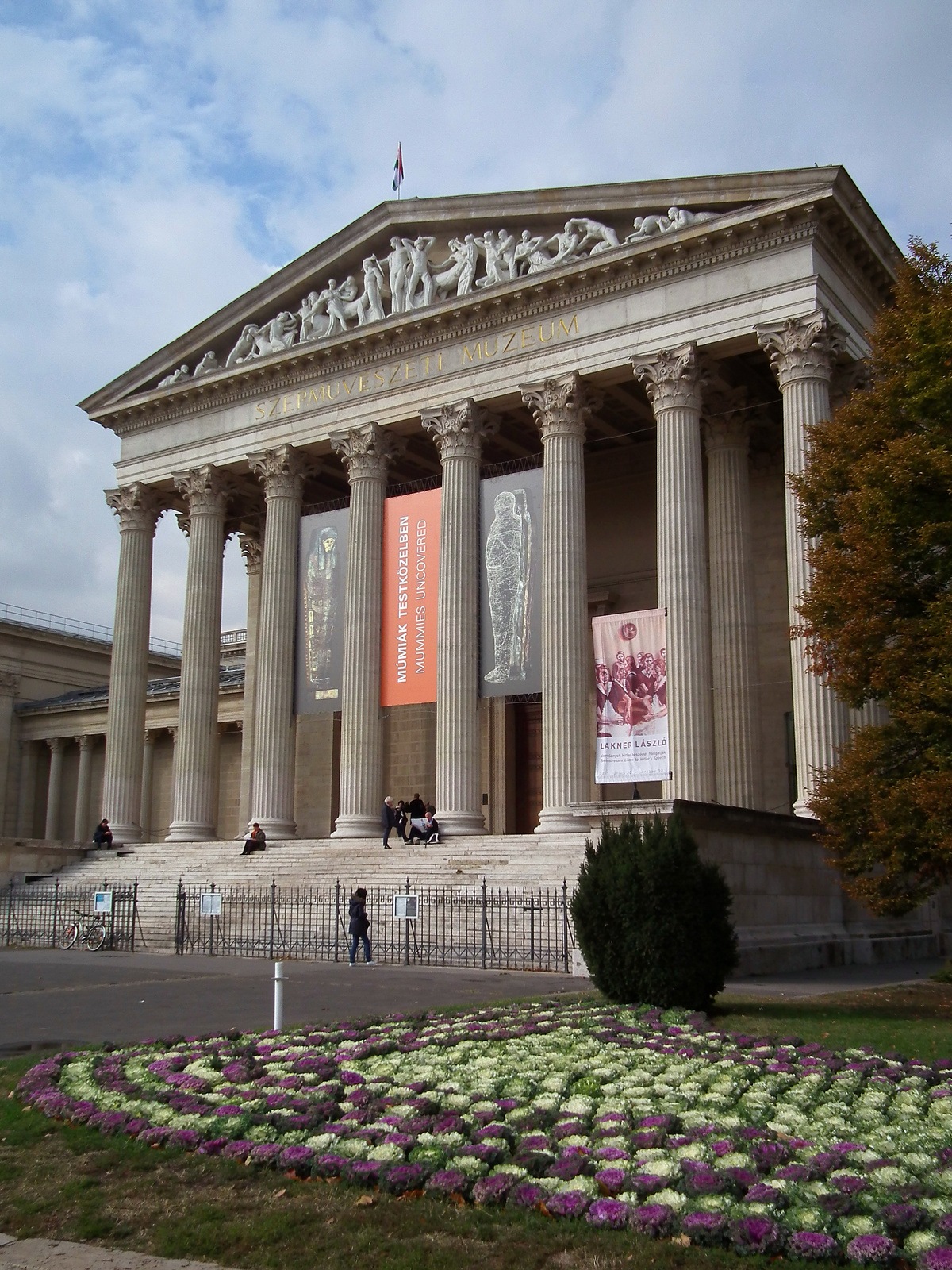 Szépművészeti Múzeum (Budapest 14, Hősök tere, Dózsa György út 39-41., Állatkerti út) This is a photo of a monument in Hungary, Identifier: 1226